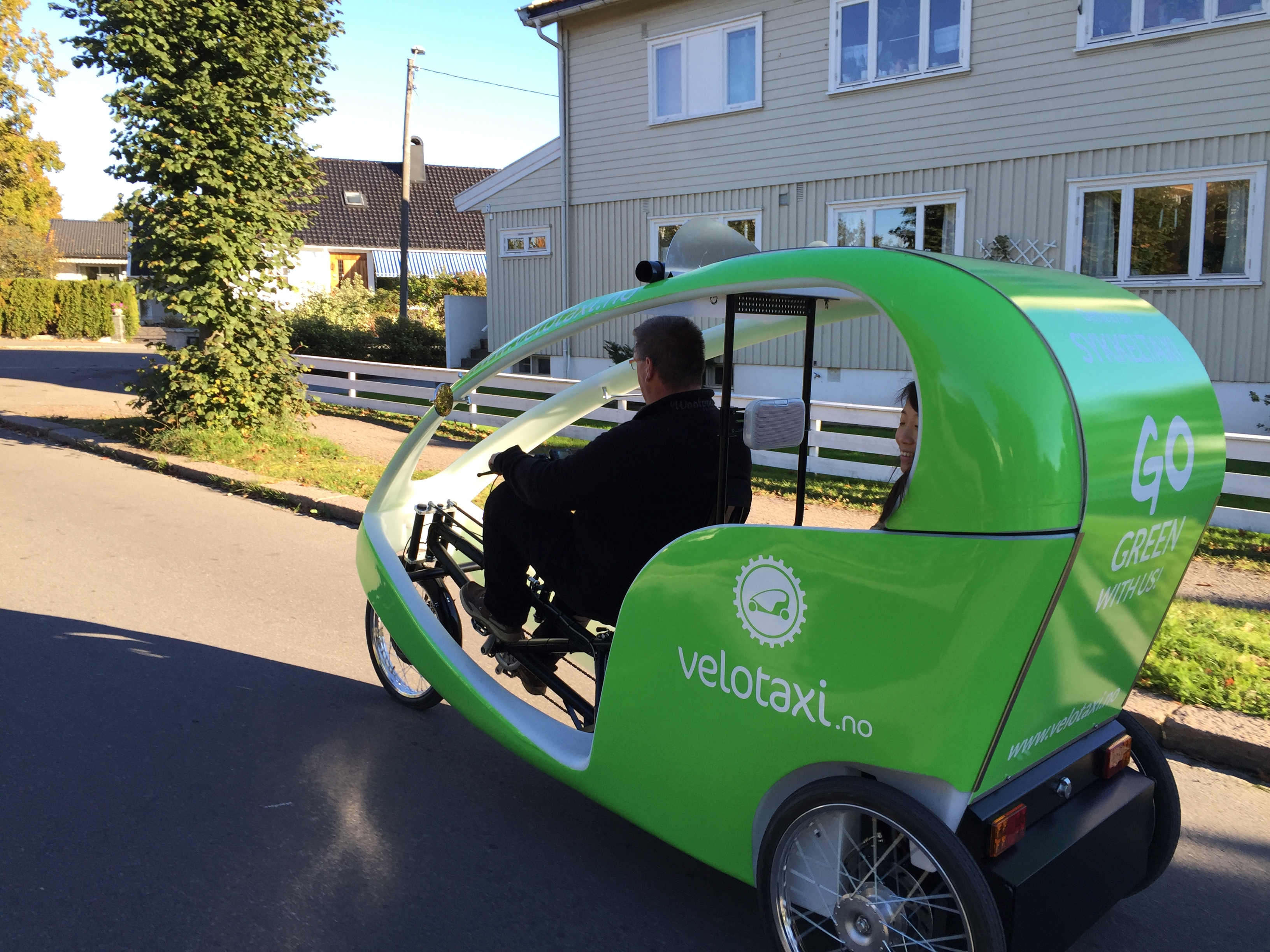 Sykkeltaxi, Tønsberg